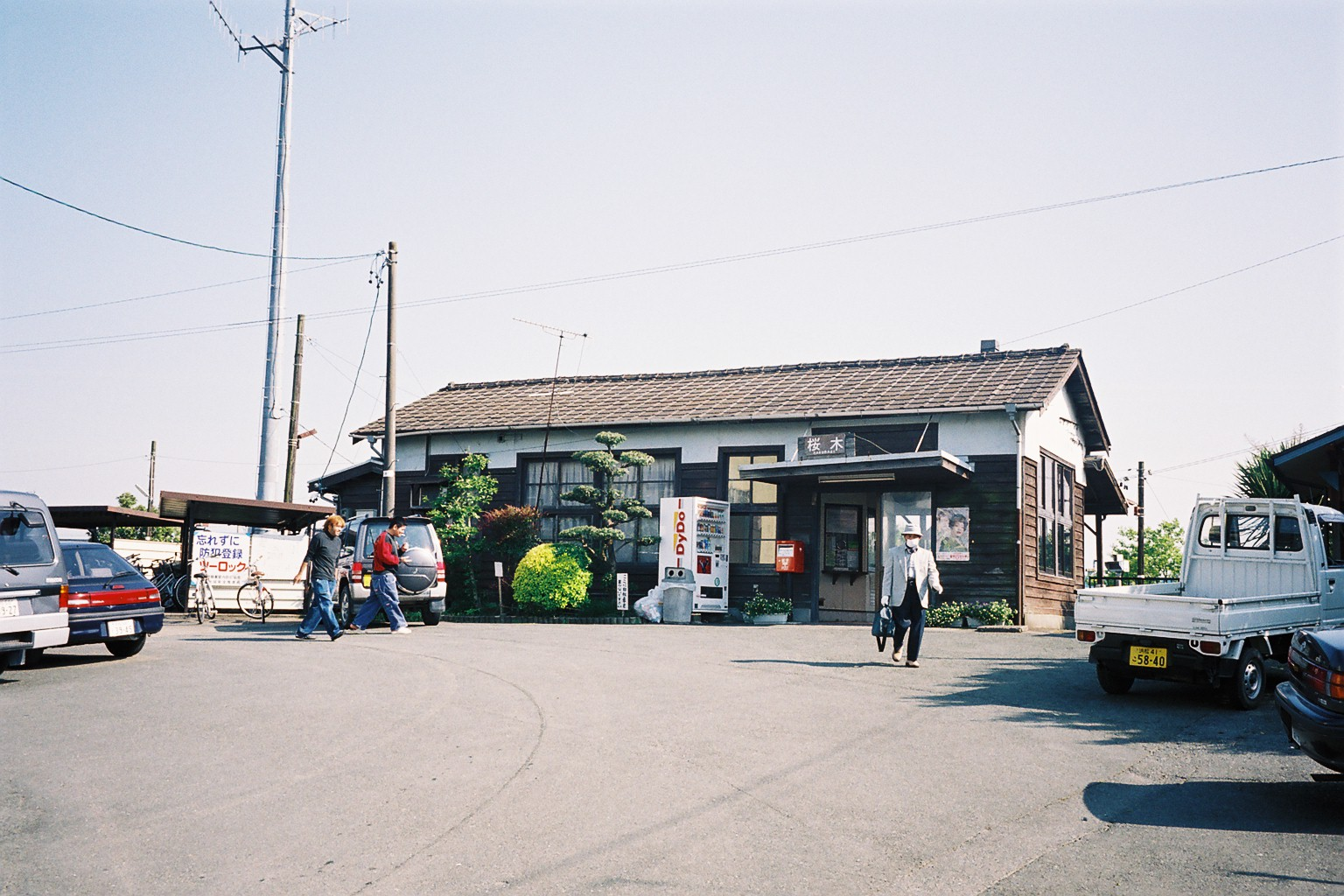 天竜浜名湖線桜木駅駅舎